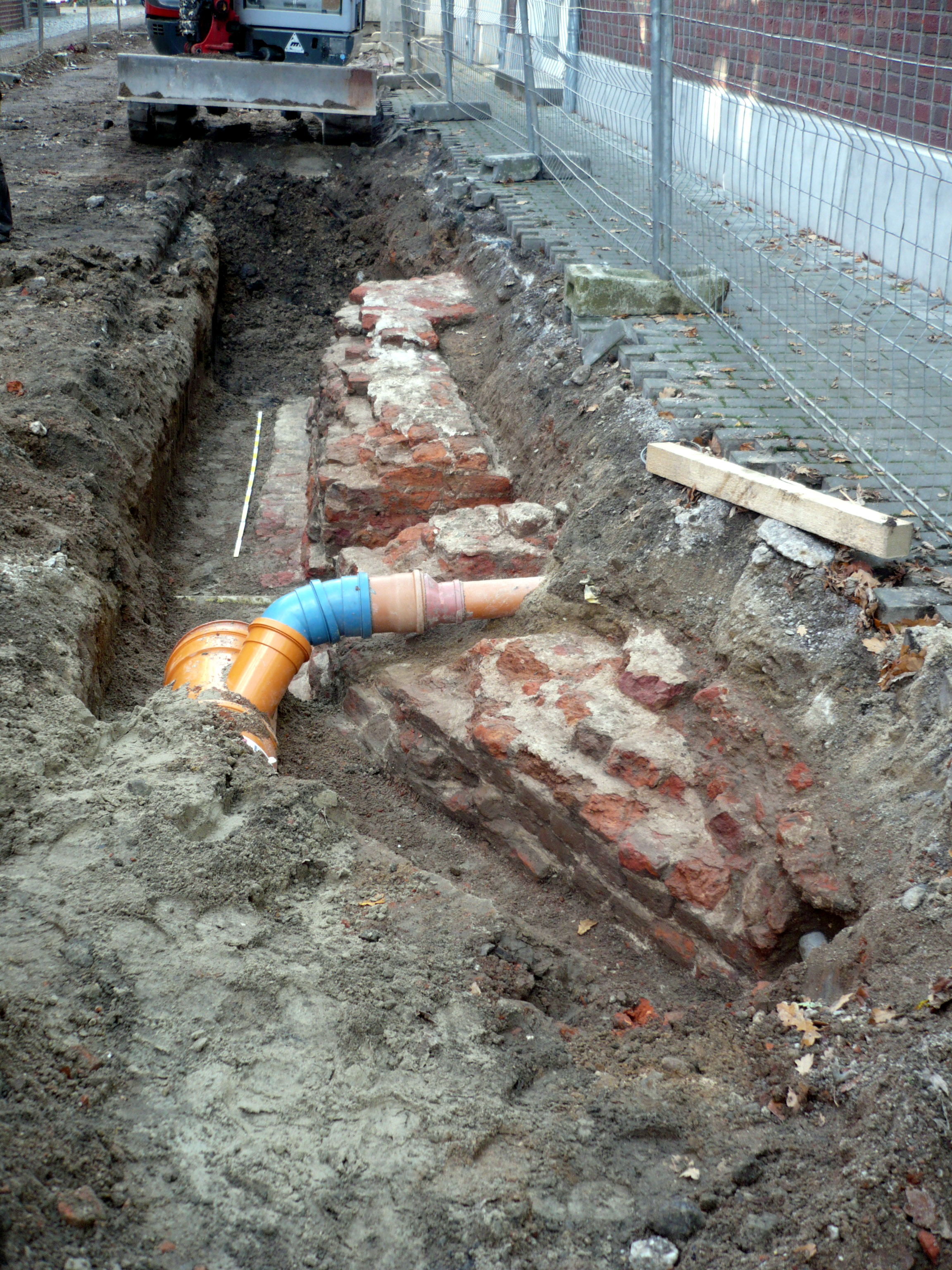 Apsis der Klosterkapelle des Hülser-Klosters in Geldern bei archäologischen Ausgrabungen im Herbst 2008.